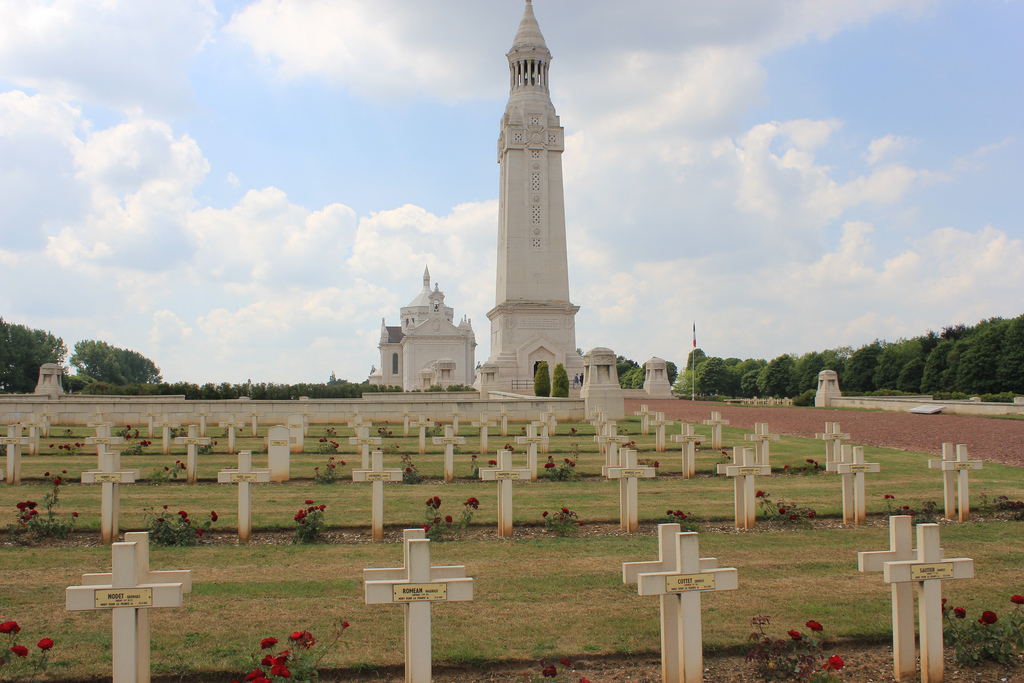 Notre Dame de Lorette (62)